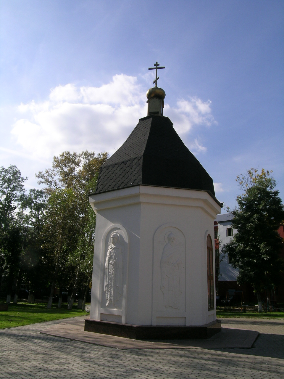 Часовня Георгия Победоносца на одной из площадей города Реутов. Там же находятся памятные плиты со списками погибших в войне и вечный огонь.